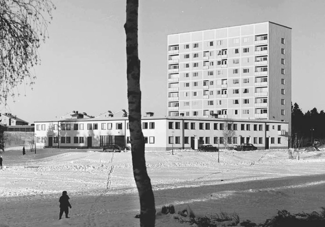 Bandhagens centrumhus (höghus och låghus) sedd från sydost